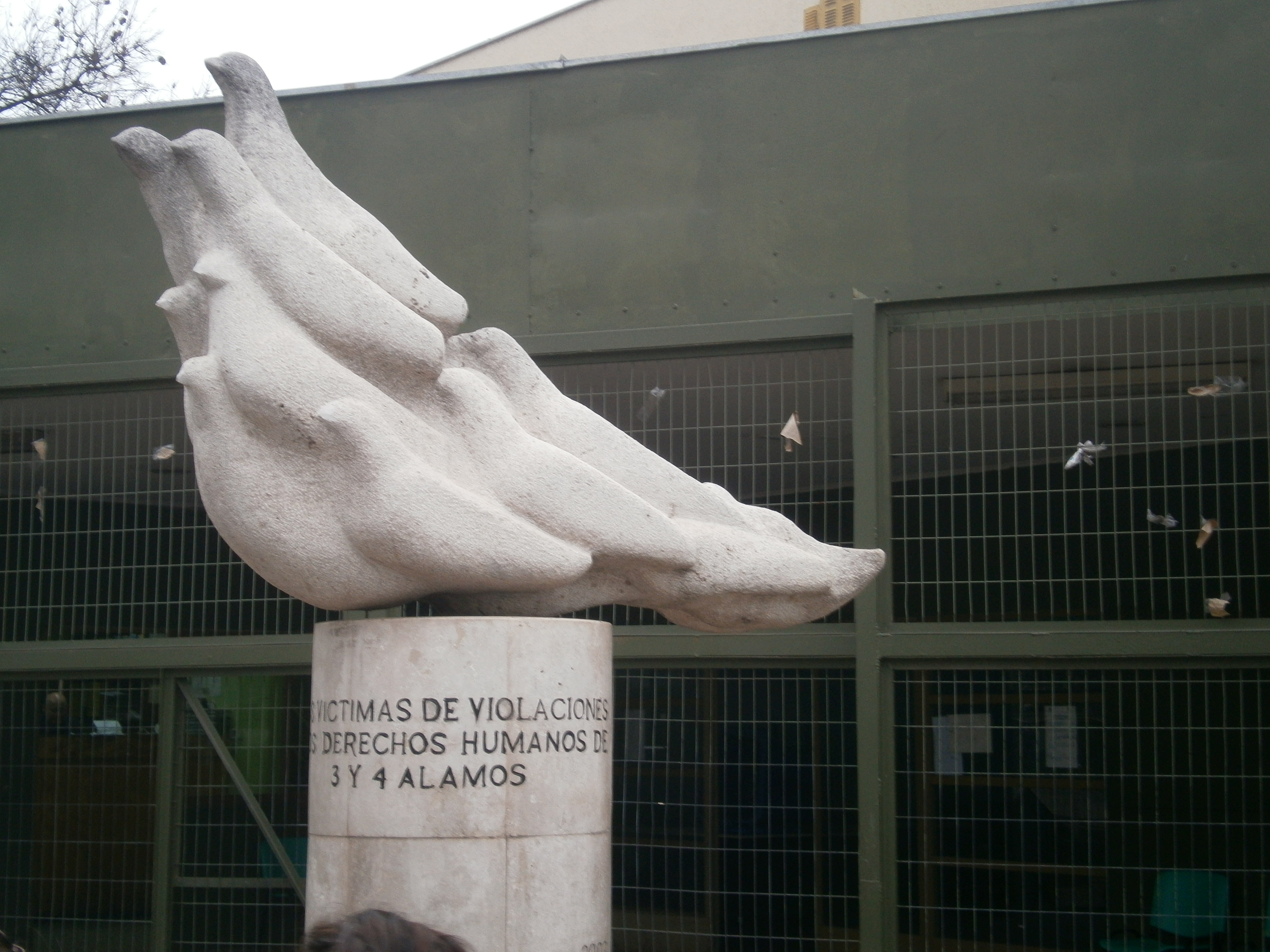 Casa de Administración del Ex Recinto de Detención Tres y Cuatro Álamos This is a photo of a national monument in Chile: 2214